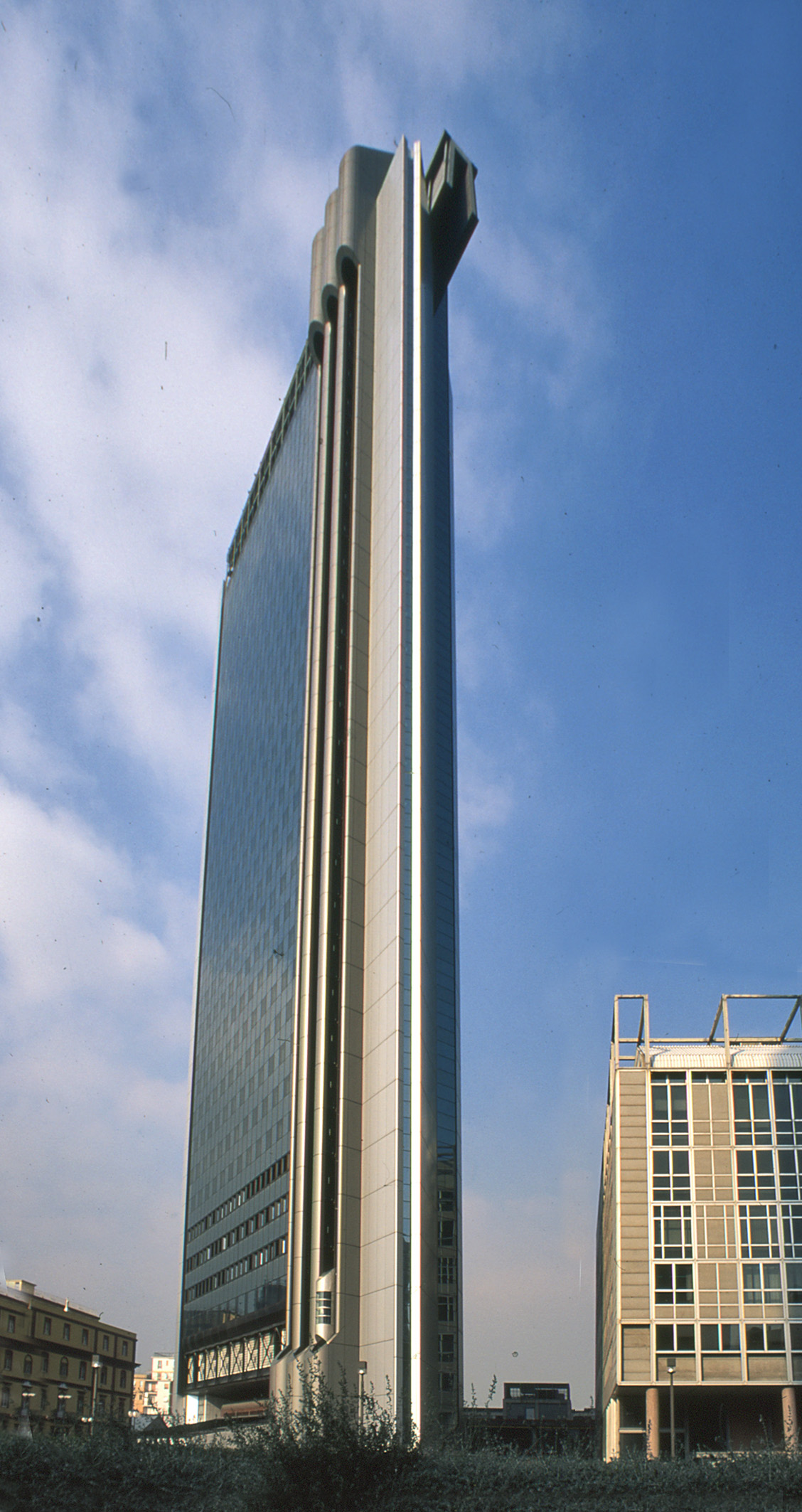 Vista di una delle due torri gemelle al Centro Direzinale di Napoli prospettanti l'ingresso su Piazza Salerno. Esse furono realizzate da Pica Ciamarra, Giulio De Luca e Avolio De Martino